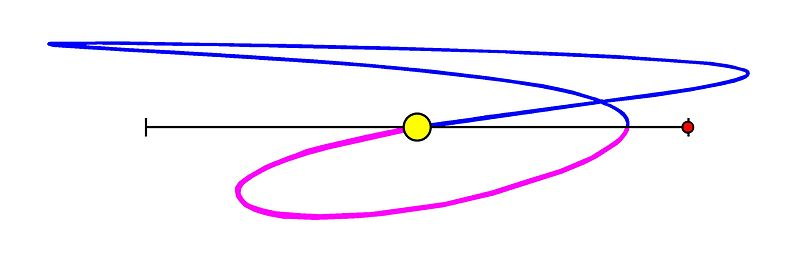 N